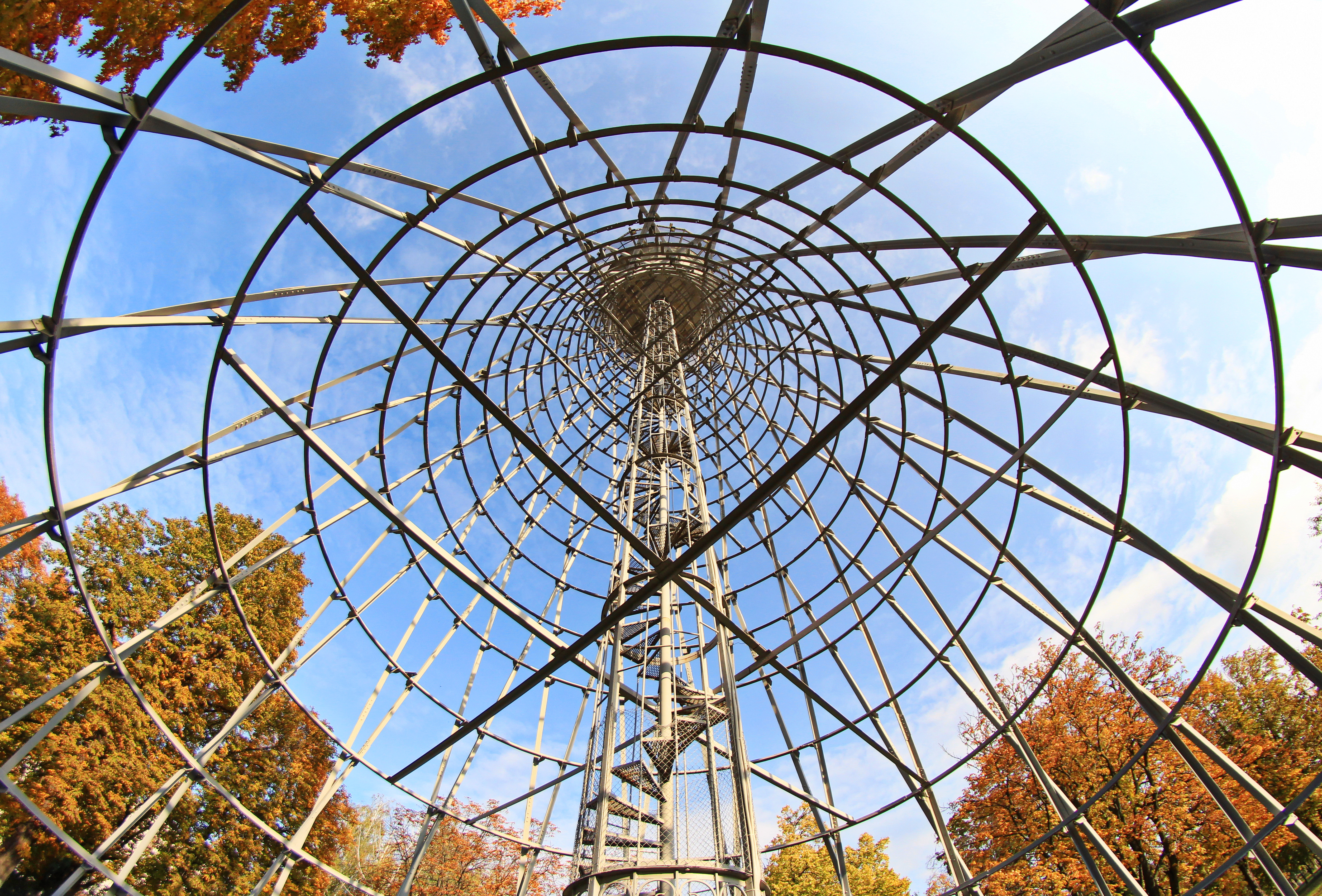 жовтень 2017